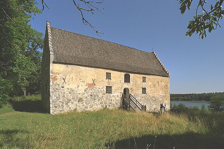 Motiv: Utö hus Nyckelord: Raä-Fastigheter Kategori: Säteri Utö hus